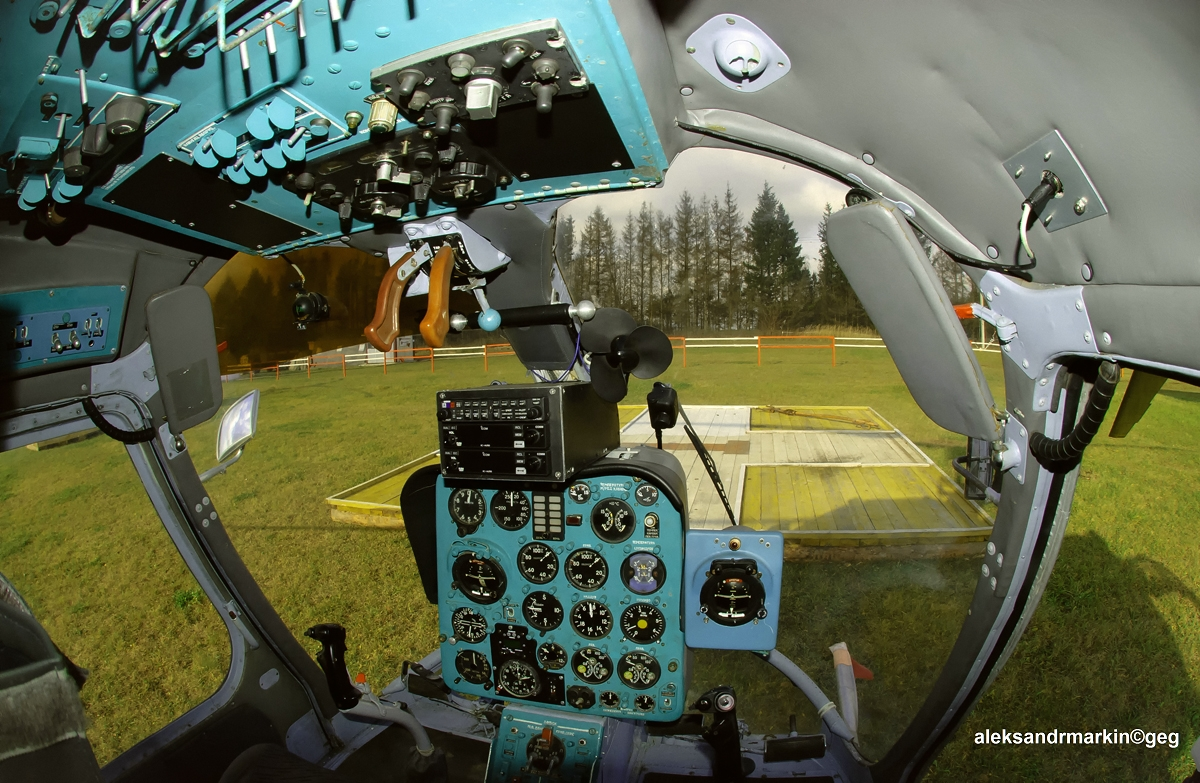 Cockpit. Kamov Ka-26, RA-24308